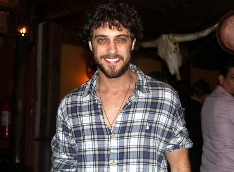 Ronny Kriwat